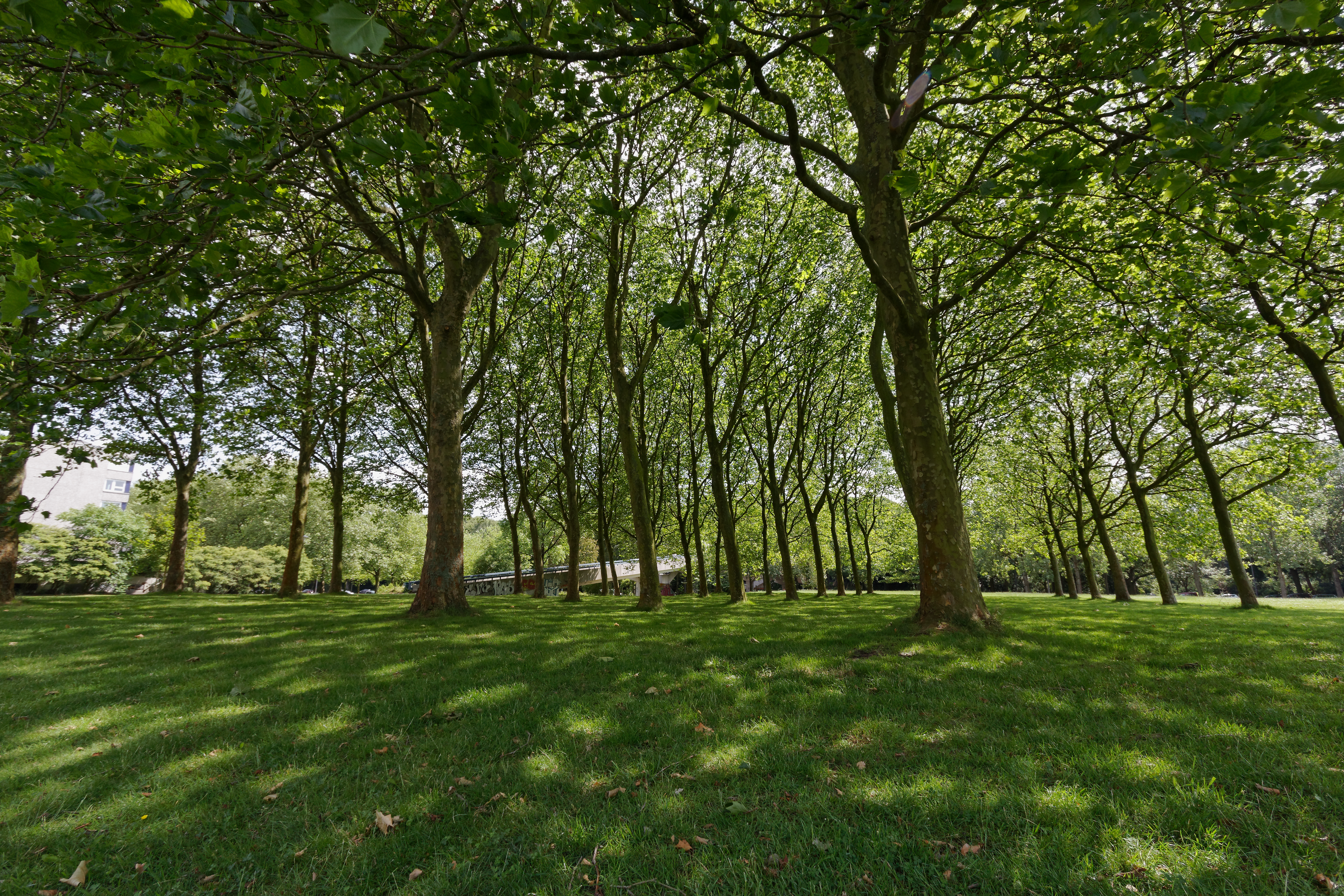 Hamburg-Winterhude, City-Nord-Park, Platanenwäldchen an der TorontobrückeThis is a photograph of an architectural monument.